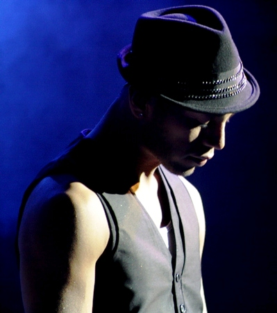 Foto de Samo durante su presentación el 22 de marzo de 2011.